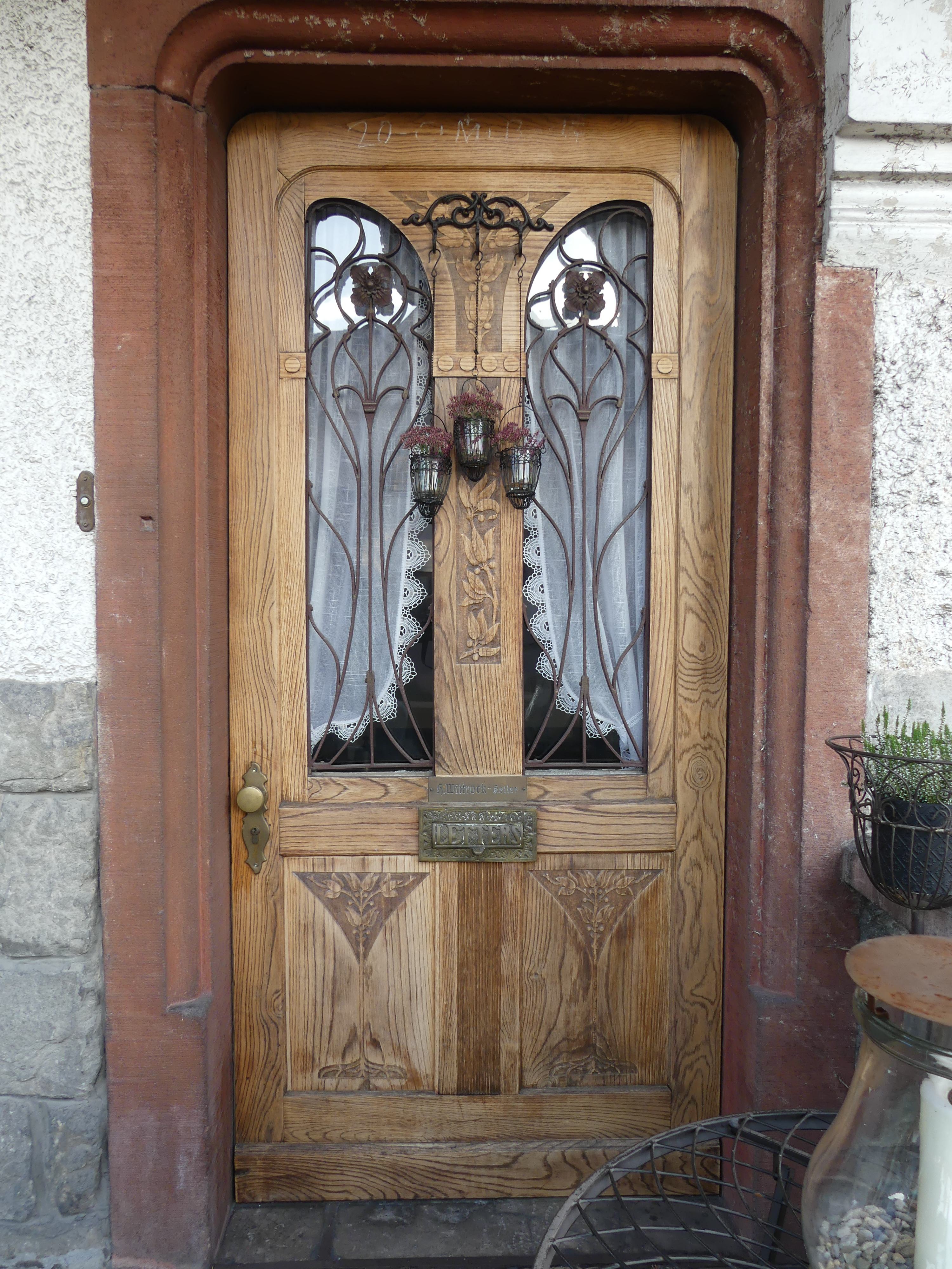 Das Haus Rheinstraße 4 in Lustenau im österreichischen Bundesland Vorarlberg, auch als „Villa Robert Bösch“ bezeichnet, ist ein für die großbürgerliche Bau- und Wohnkultur der Zeit um 1900 charakteristischer Jugendstilbau. Die geschnitzte Eingangstüre hat zwei Fenster mit Schmiedeeisengitter.